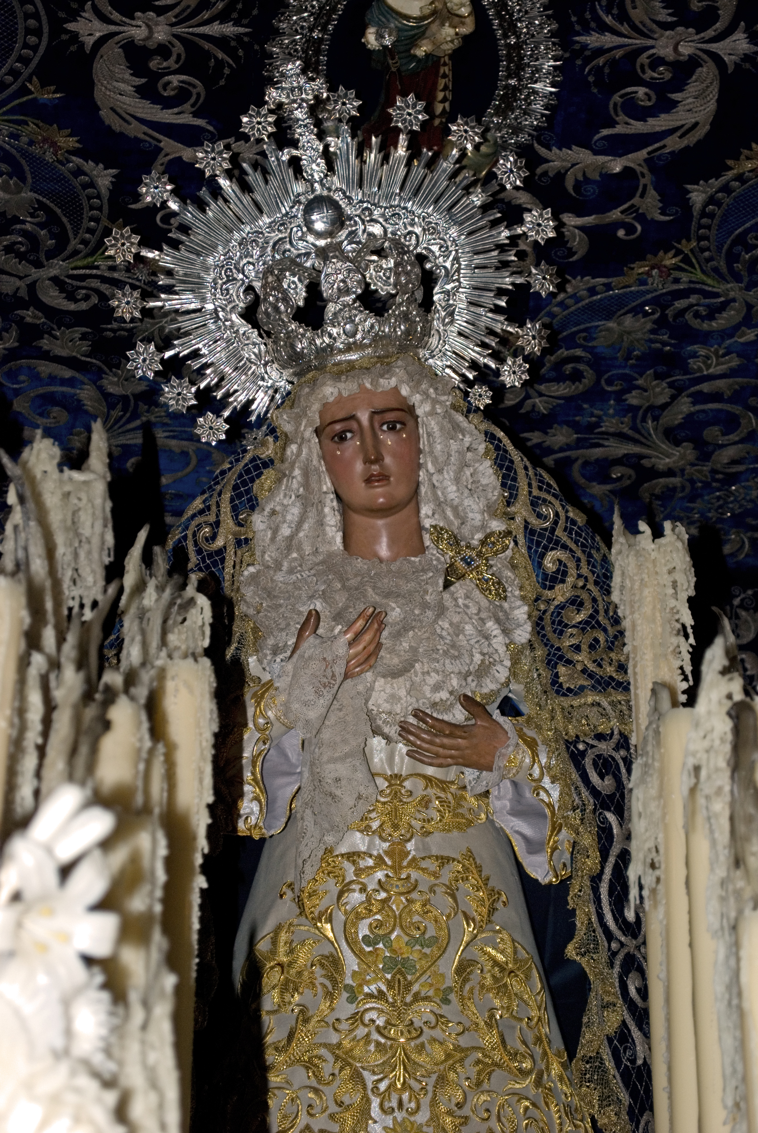 Virgen de la Hiniesta, en su paso, en la iglesia de San Julián (Sevilla), fotografiada un miércoles santo.